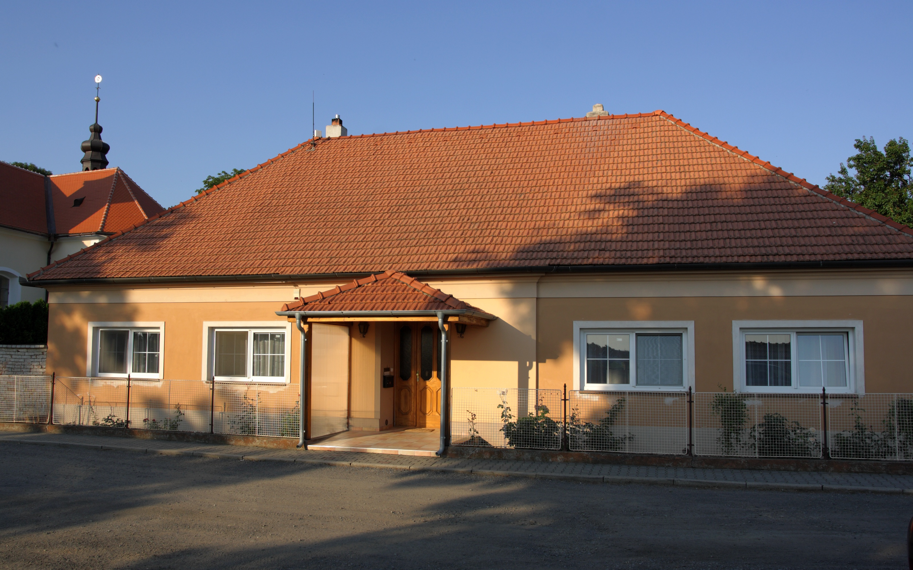 Syrovice - římskokatolická fara.